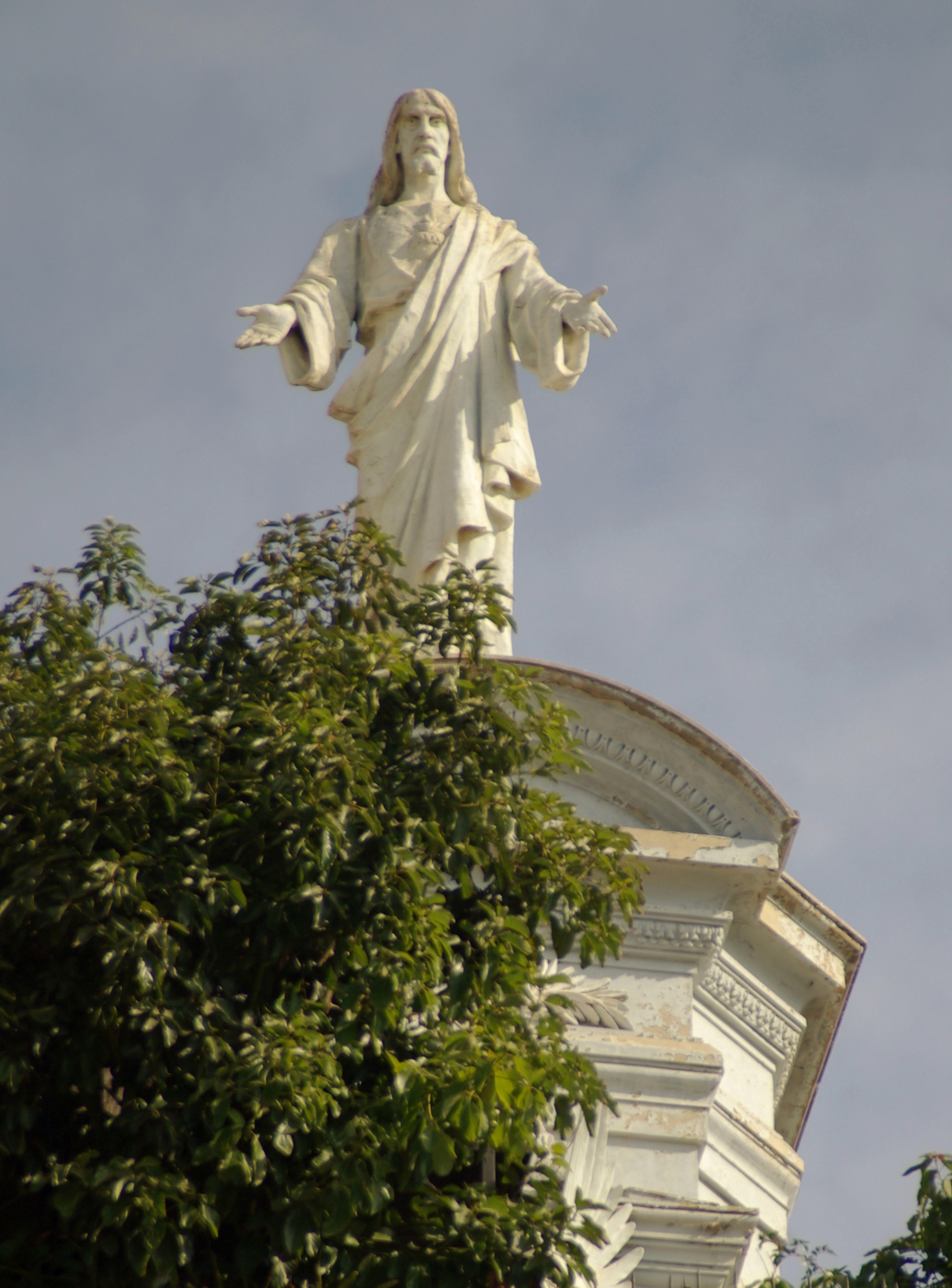 La estatua del Cristo Redentor en el cerro Bellavista de Valparaíso. Foto tomada desde la calle Aldunate